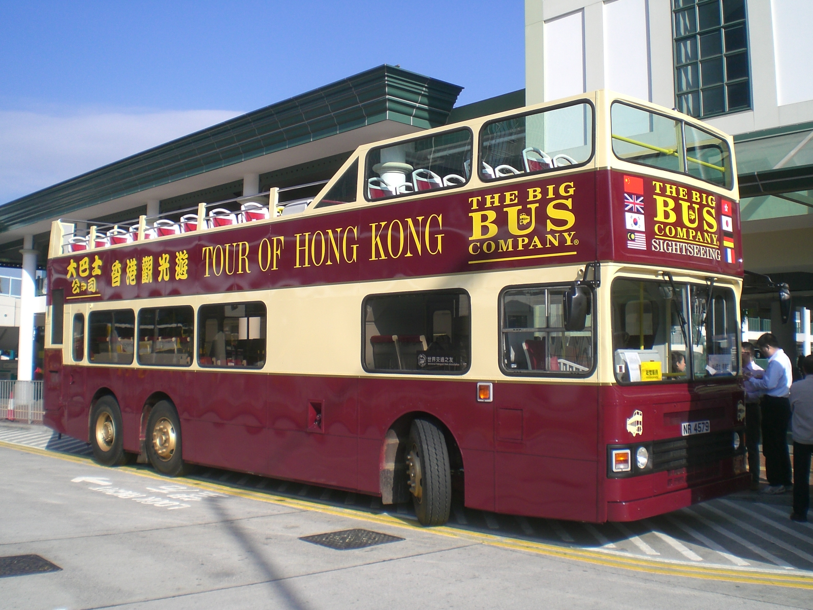 大巴士公司的丹尼士禿鷹開篷巴士